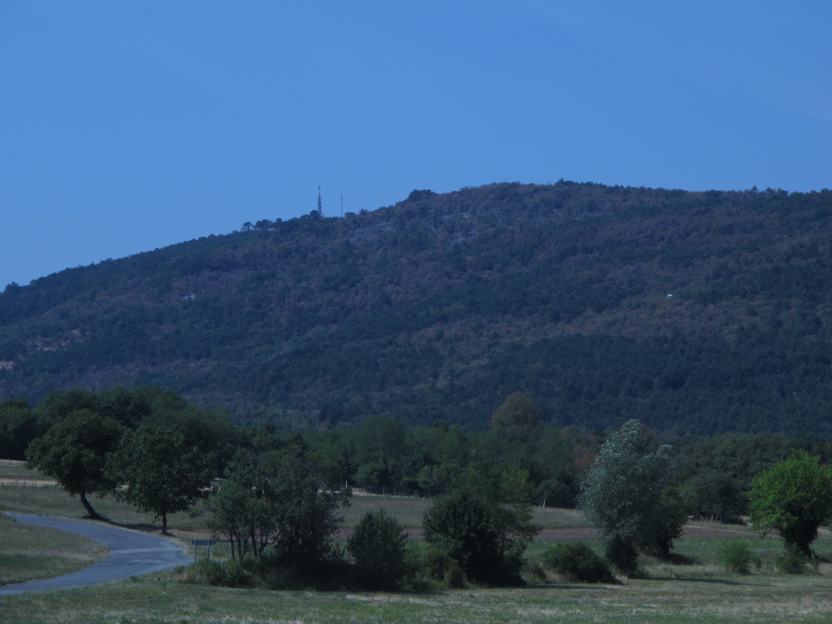 Posledice požara na Trstelju